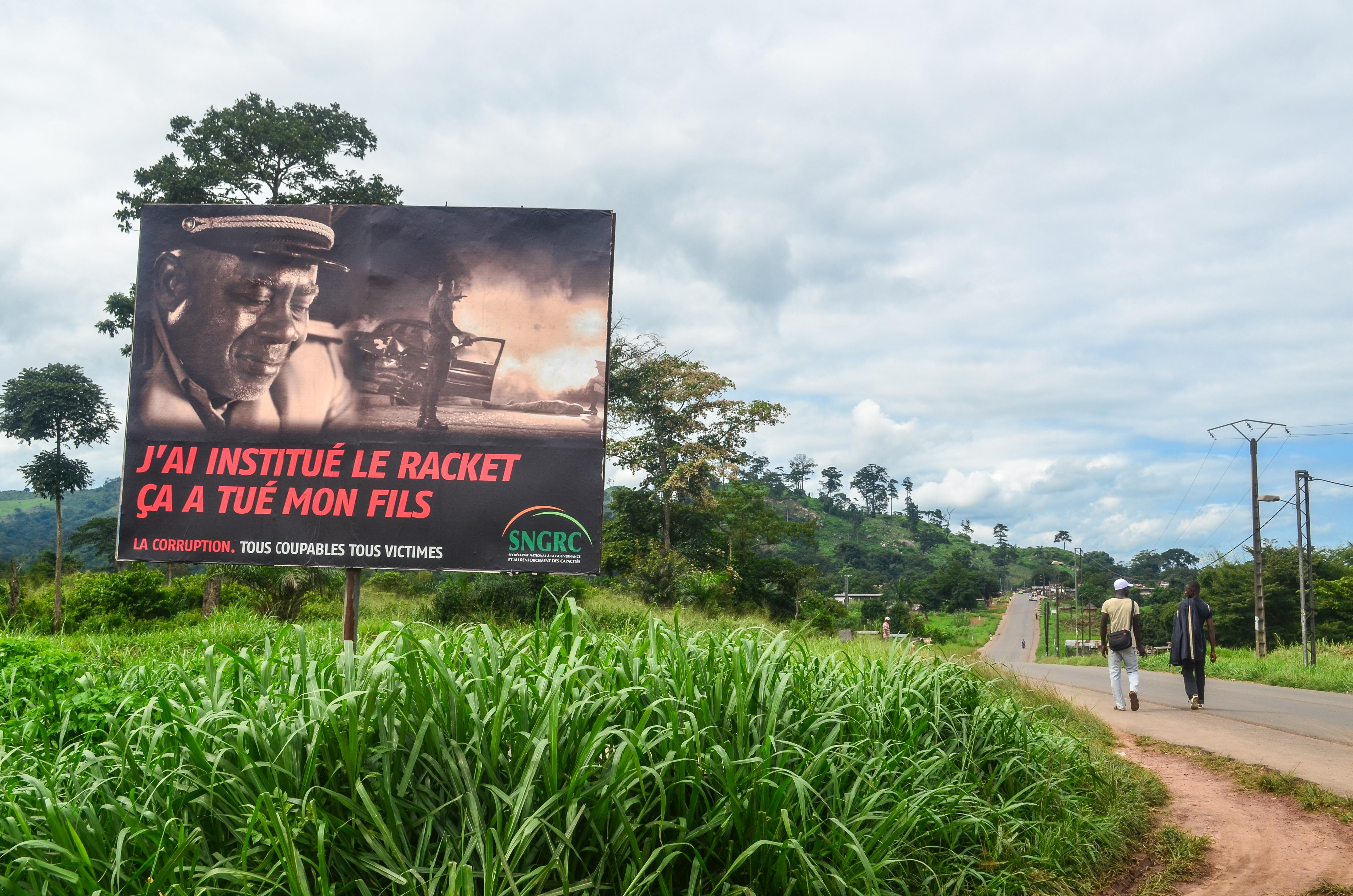 Affiche d'une campagne de sensibilisation contre la corruption en Côte d'Ivoire.